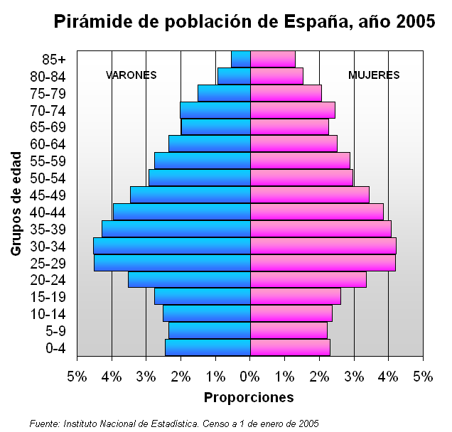 Pirámide de población de España en el año 2005 Población residente y censada en todo el territorio español a 1 de enero de 2005. Incluye la población extranjera residente en el país. Según este censo, España cuenta con 44.108.530 habitantes (21.780.869 varones y 22.327.661 mujeres) Un 1% en la gráfica representa a unas 441.085 personas.